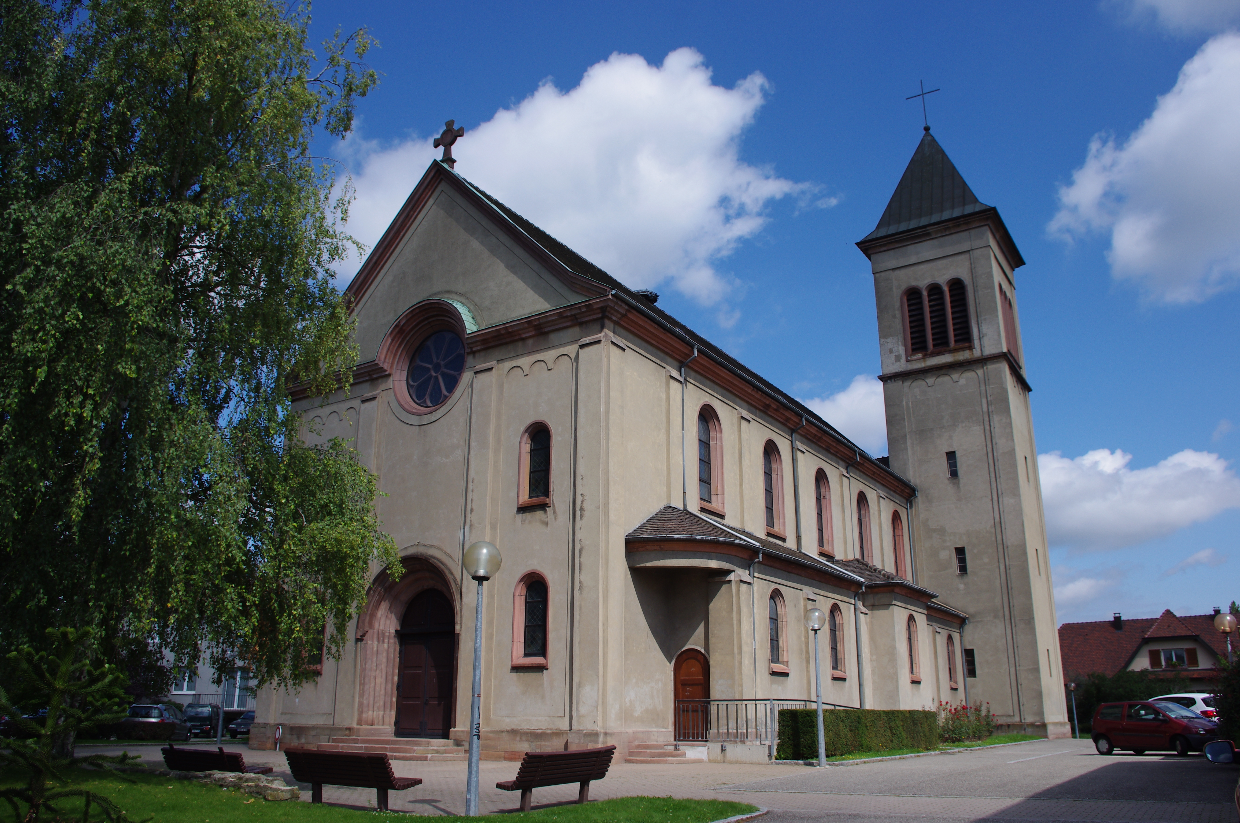 Eglise catholique XXème siècle (Illzach - haut-rhin)